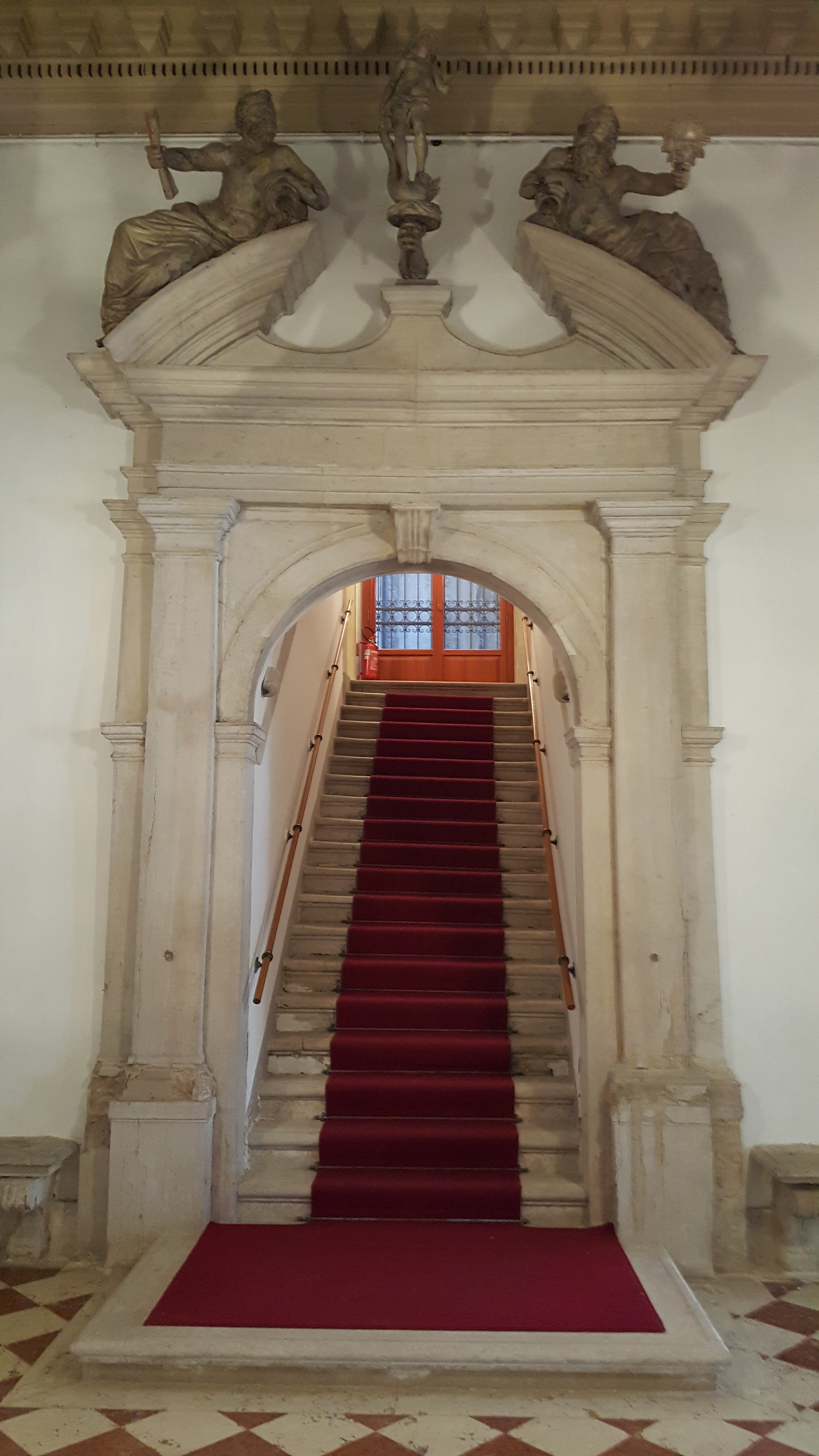 Aufgang vom Wassergeschoss zum Großen Saal im Primo Piano Nobile: Portal mit allegorischen Motiven und Sicht bis zum Mezzanin.